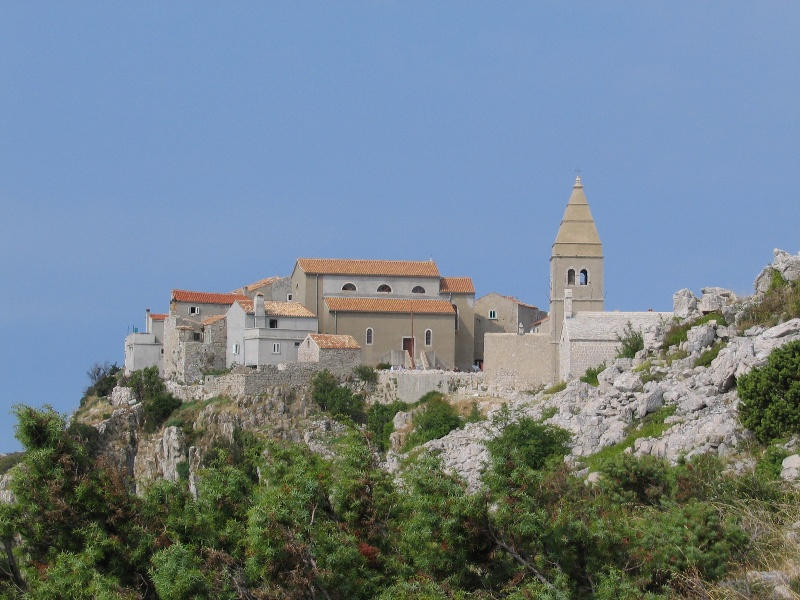 Blick auf Lubenice